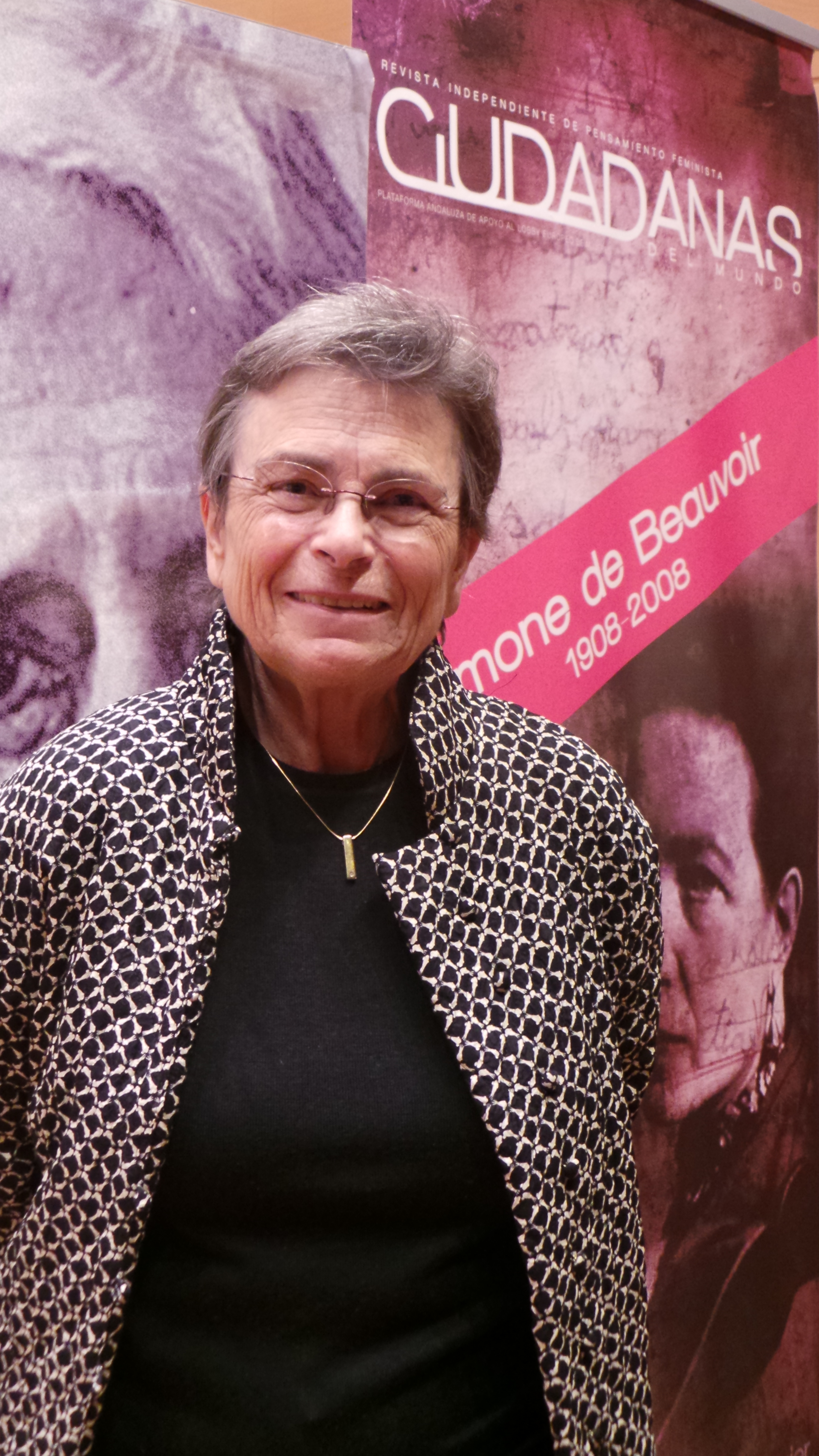 Filóloga española